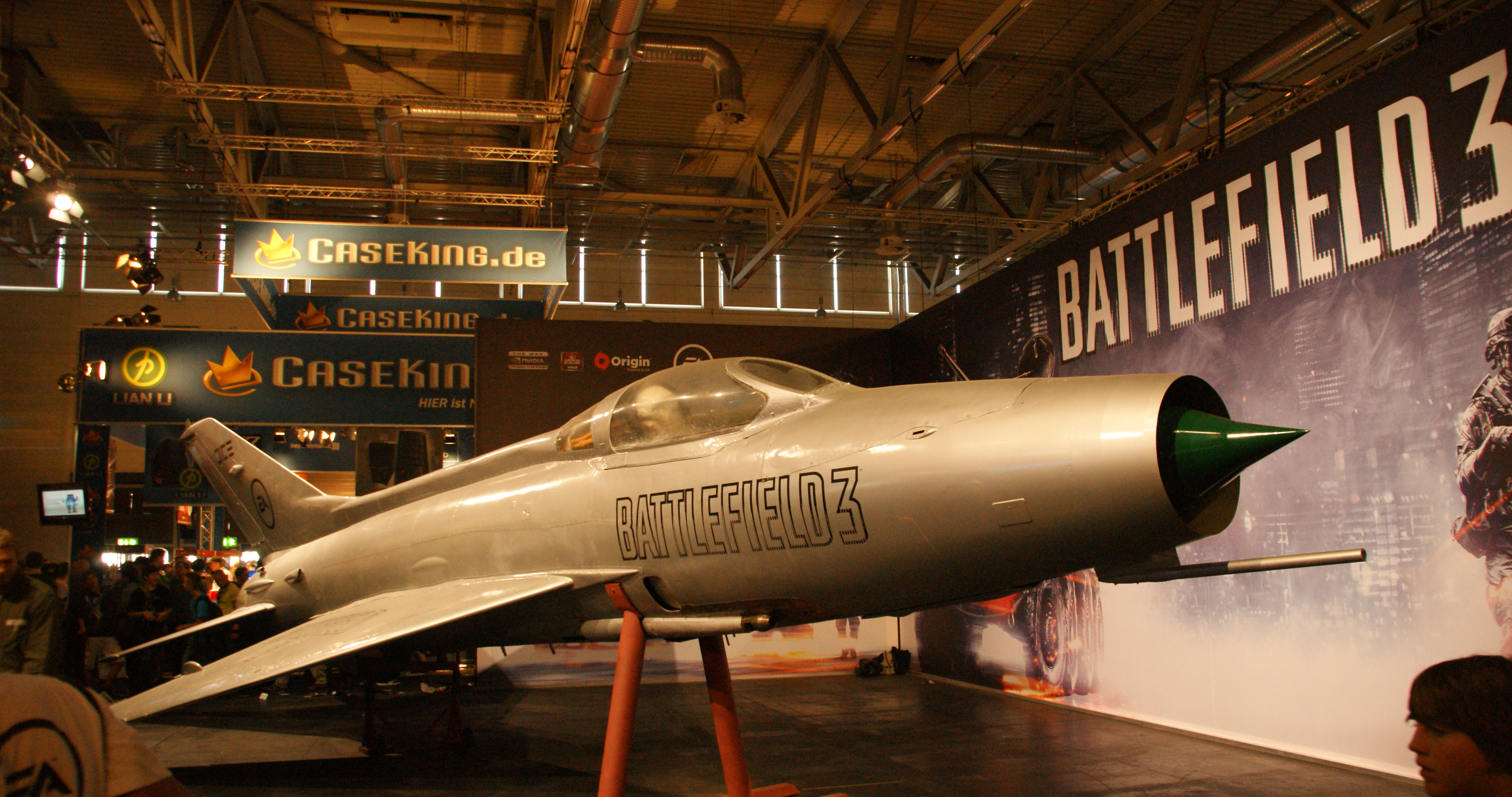 GamesCom'11